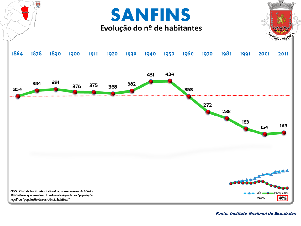 Censos 1864/2011